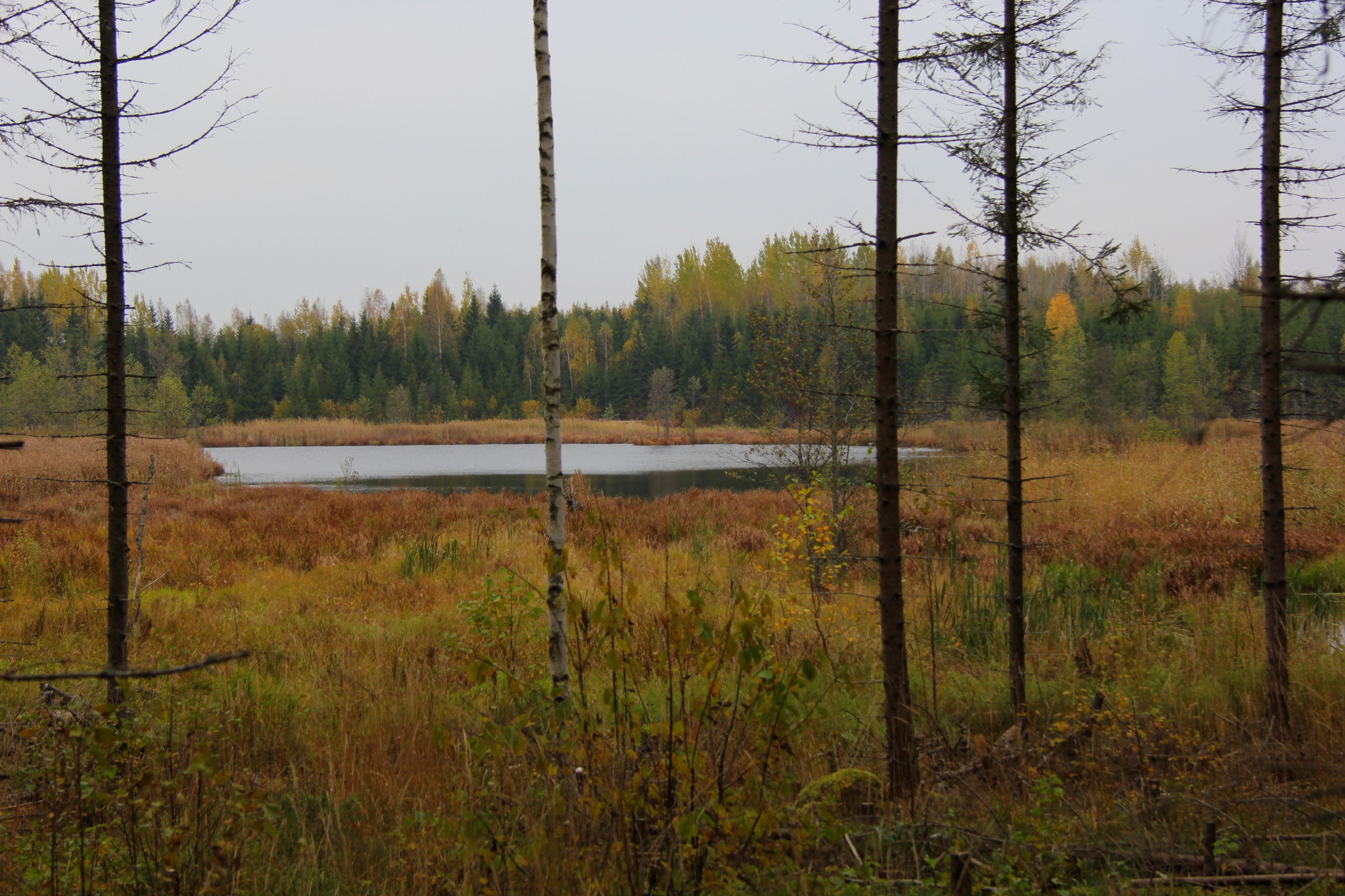 Ezers